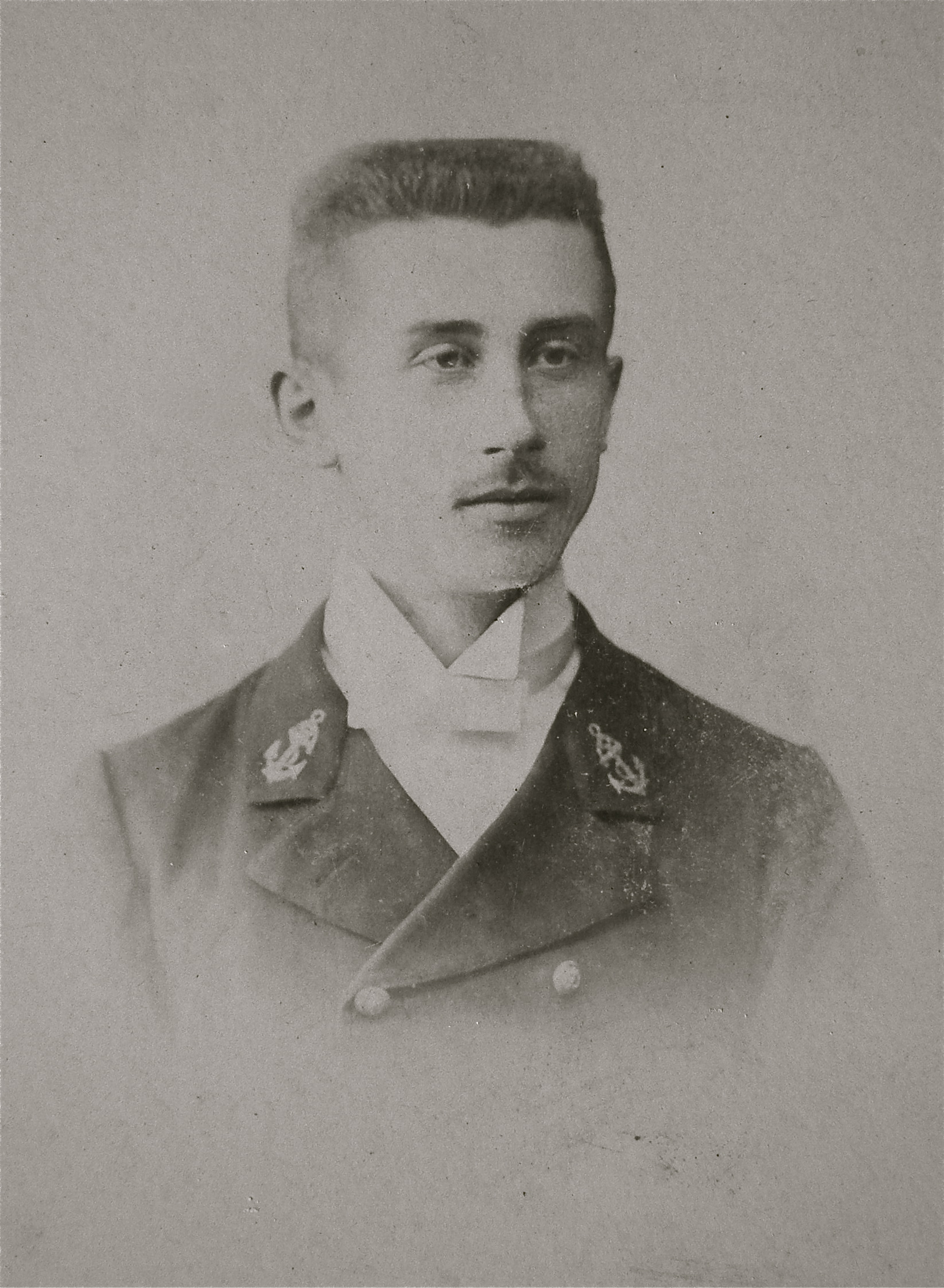 Photo datant de l'entrée de Georges Robert à l'Ecole navale.